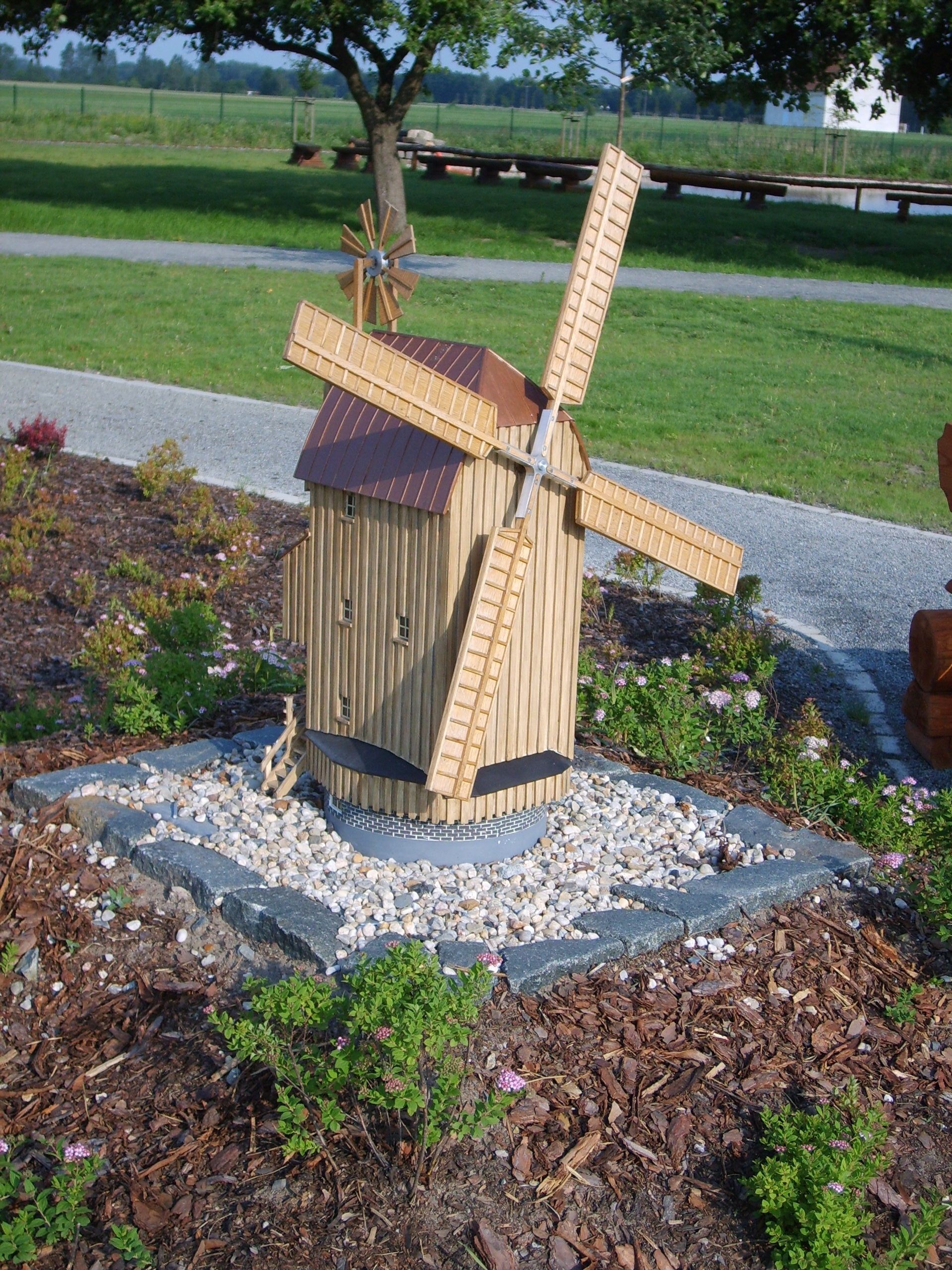 Modell der Paltrockwindmühle in Oppelhain im Miniaturenpark Elsterwerda